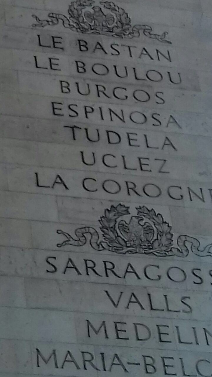 Baztan pariseko garaipen arkuan. Baztan haraneko gudua.